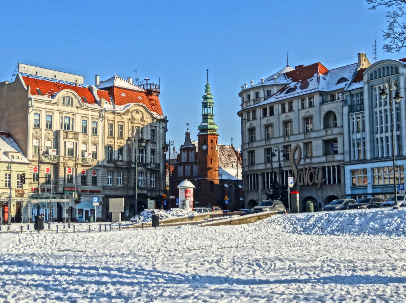 Plac Teatralny w Bydgoszczy